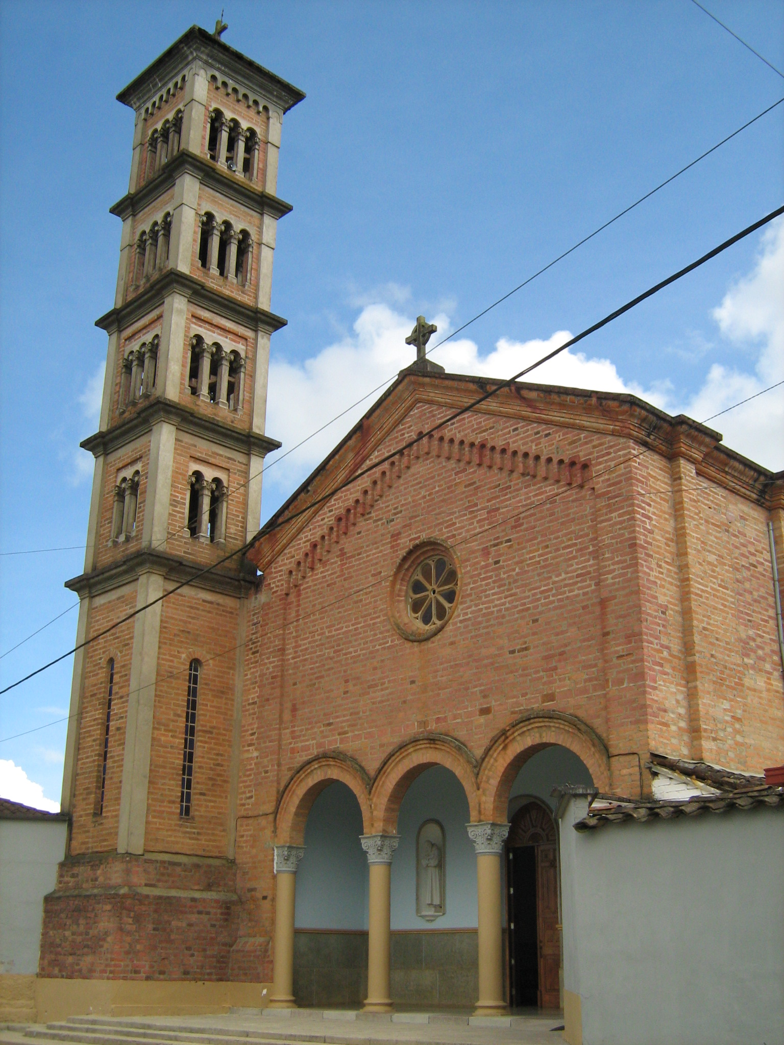 Iglesia de San Francisco y Santa Clara de Asís en el municipio de Santa Rosa de Osos., Antioquia, Colombia.